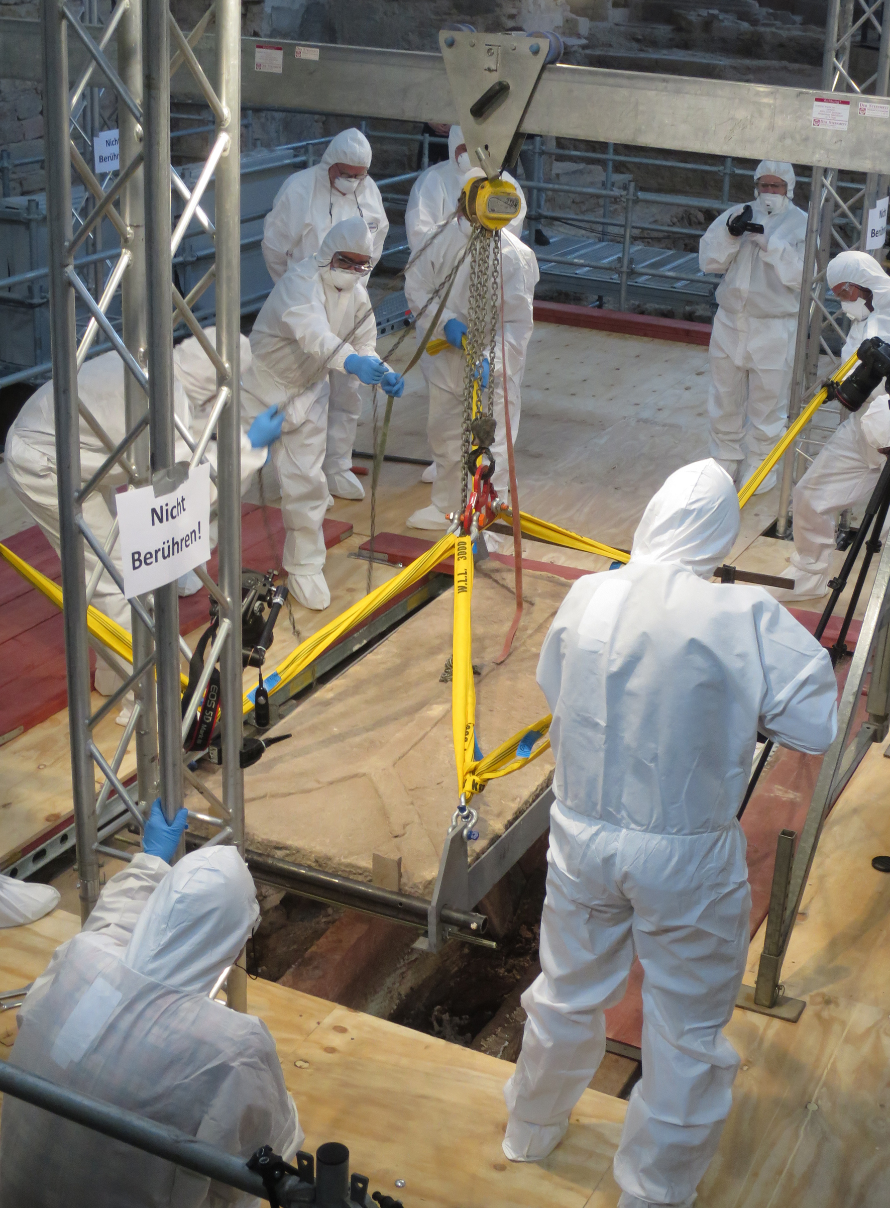 Abheben des Sarkophagdeckels der zentralen Bestattung in St. Johannis in Mainz